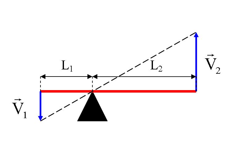 Schéma de fonctionnement d'un levier pour l'étude cinématique Auteur : Xavier Lory